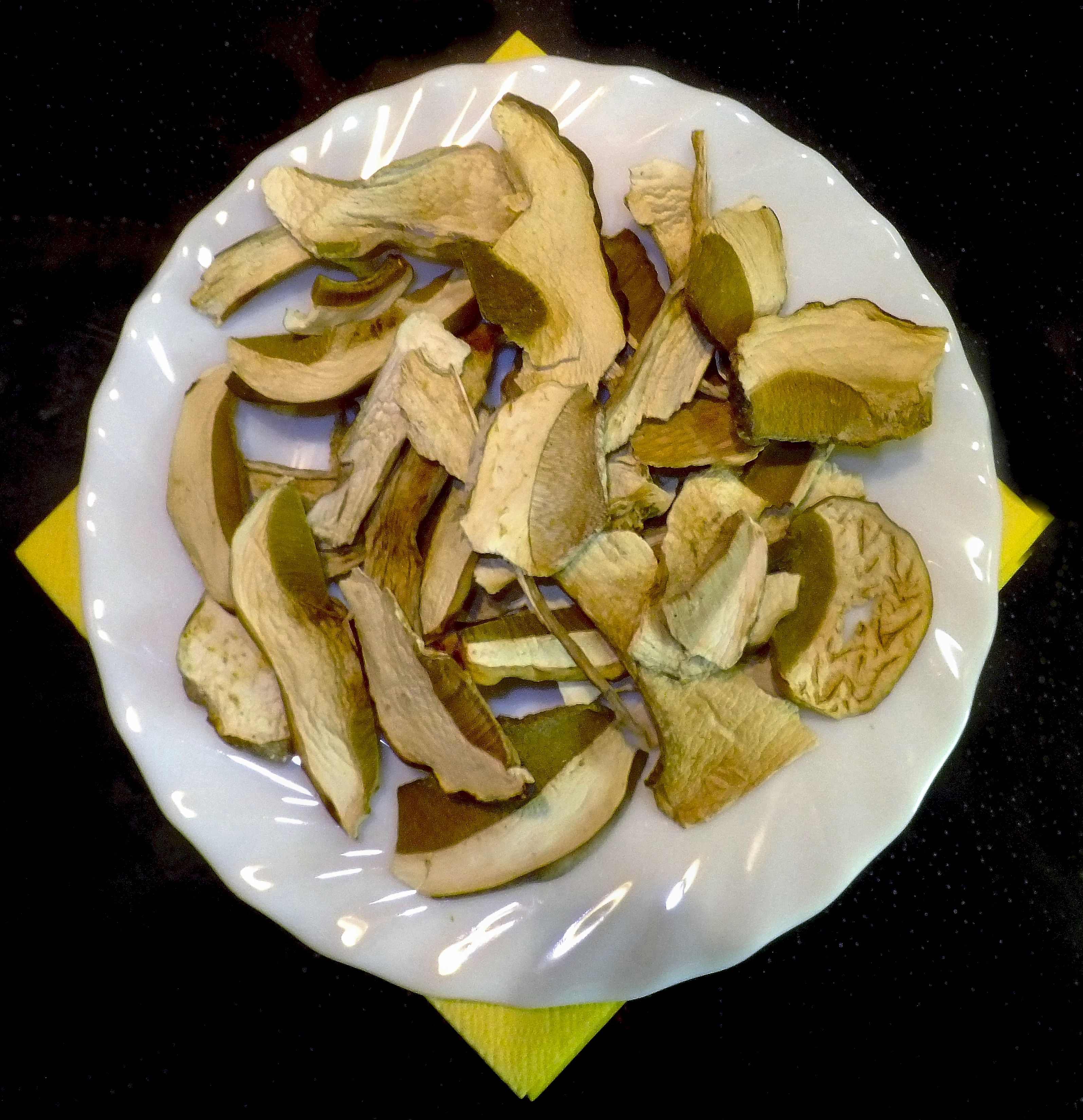 Stein- und Sommersteinpilze, getrocknet